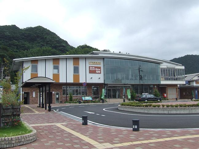 JR若狭高浜駅新駅舎